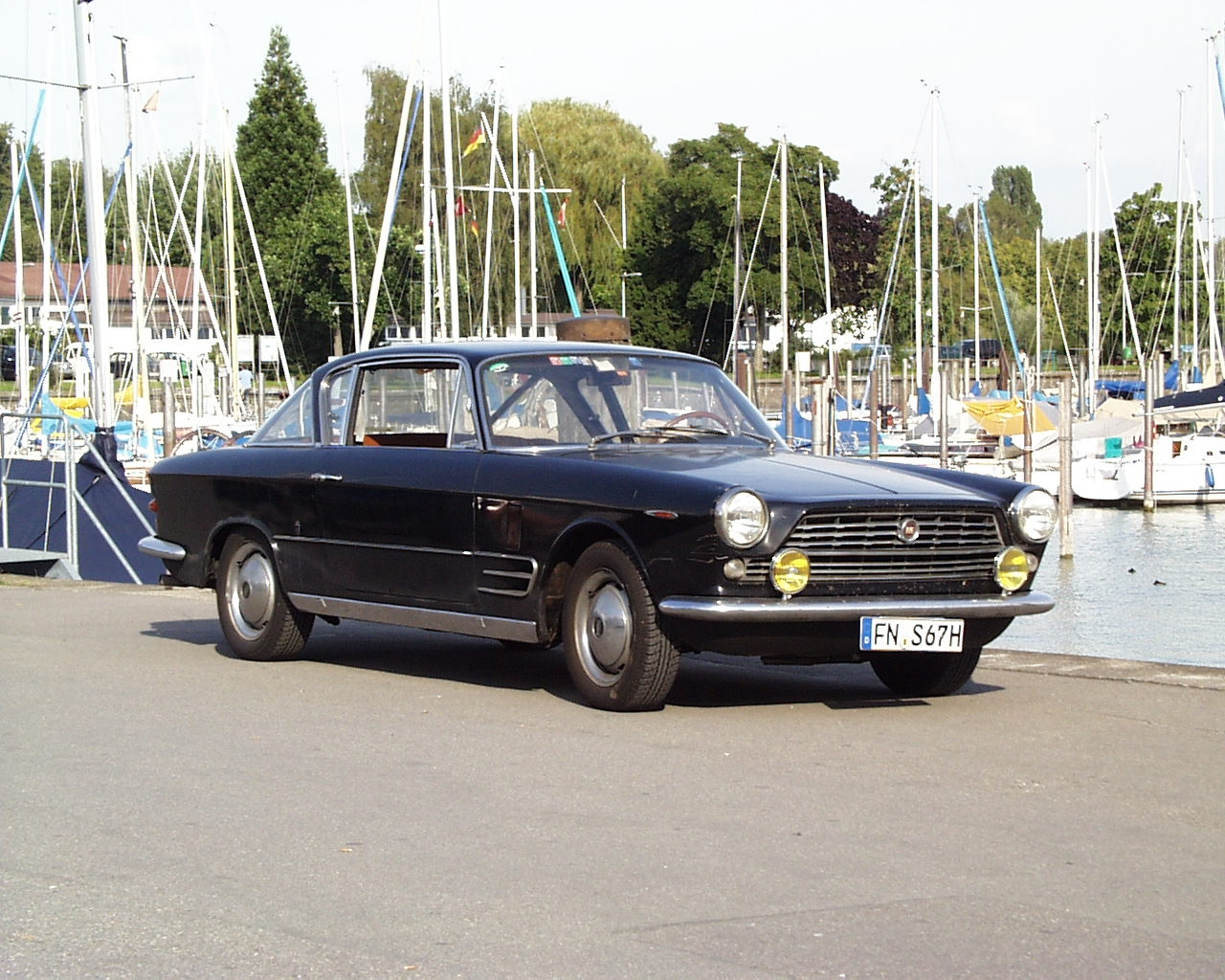 Fiat 2300 S Coupe 2. Serie am Hafen Friedrichshafen